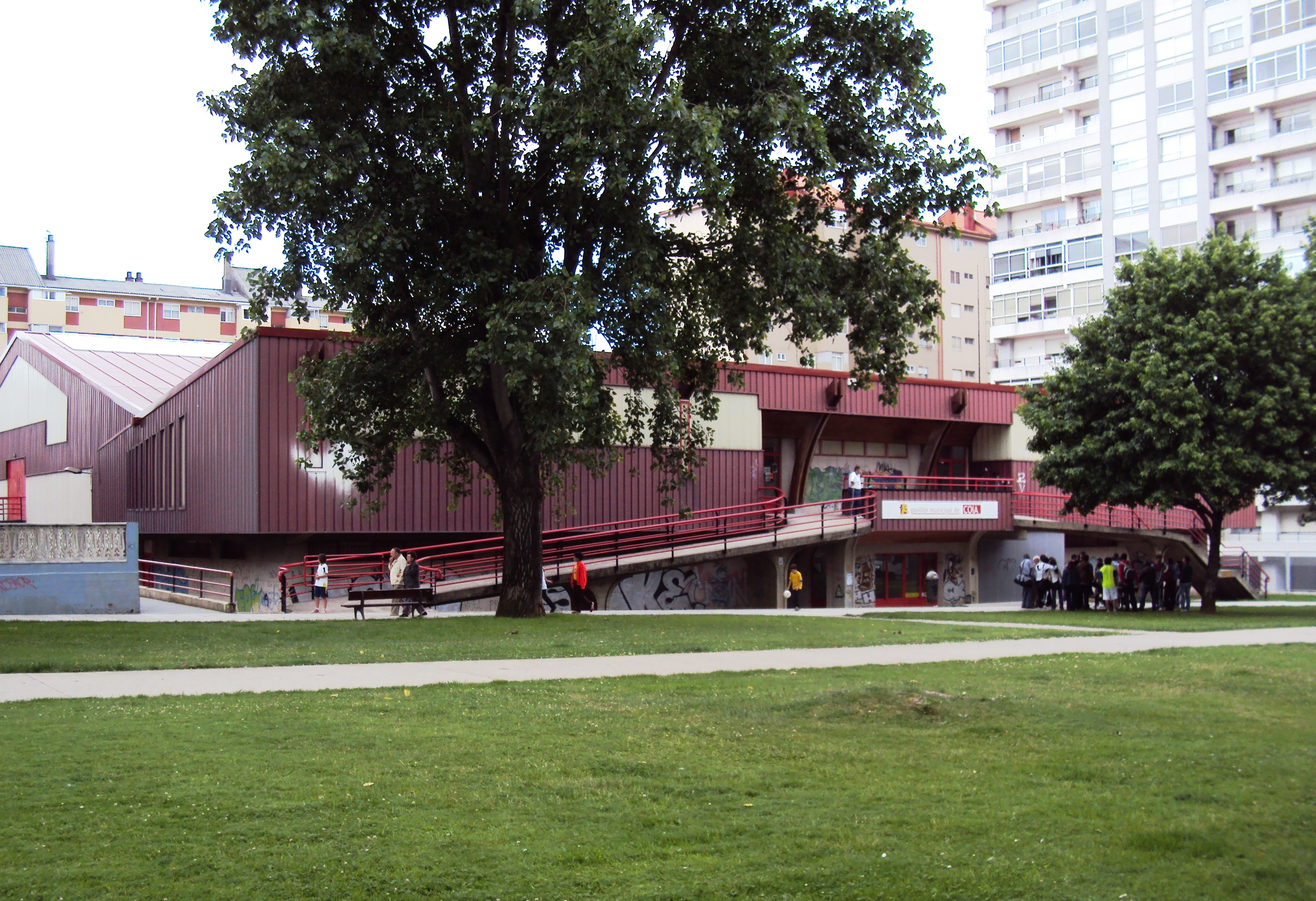 Pabellón Municipal de Coia, Vigo.